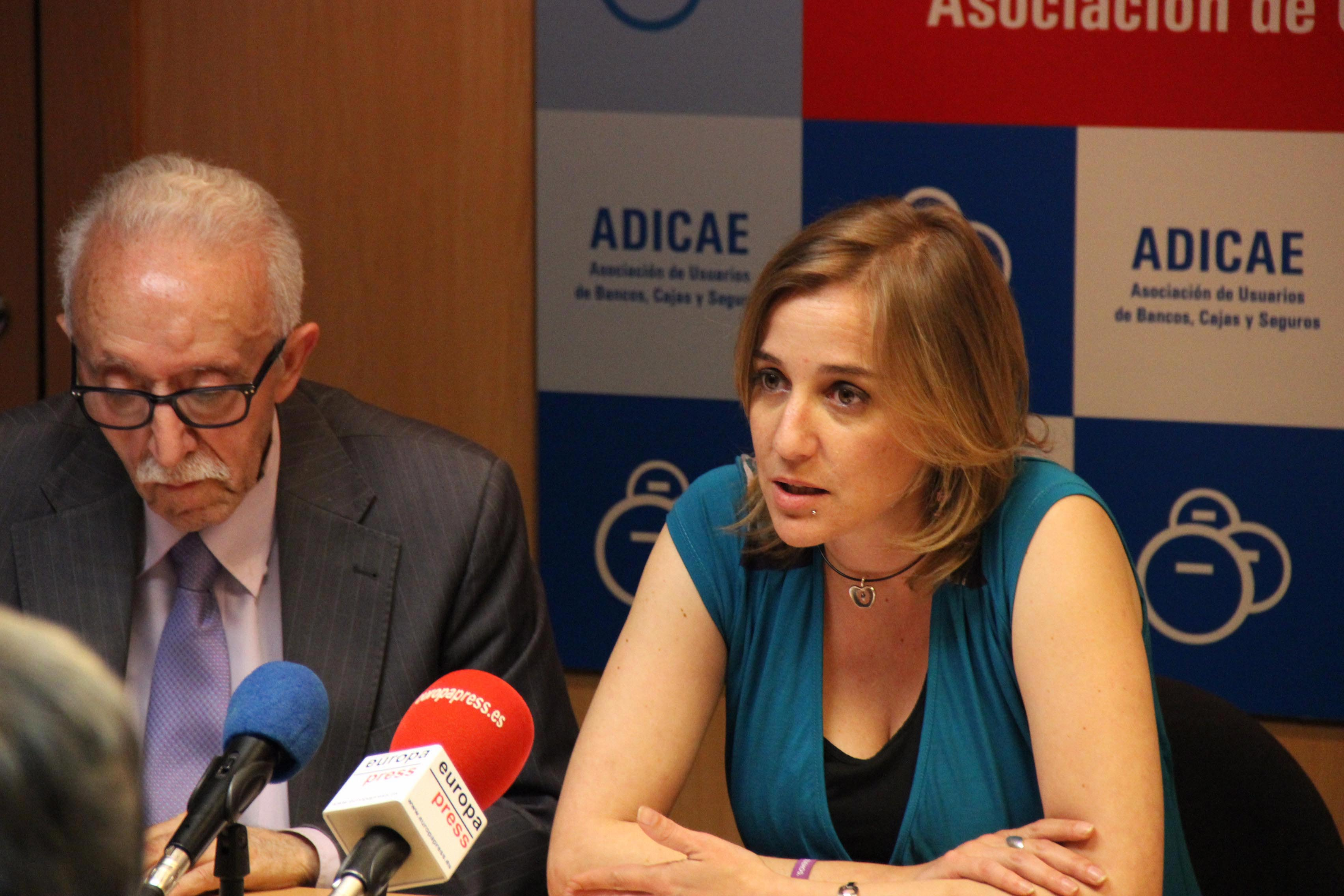 Podemos inaugura los encuentros digitales de ADICAE ‘Consumidores y Políticos’. • La asociación pone en marcha el primer ciclo de encuentros entre políticos y consumidores, donde los partidos deberán responder a las preguntas que más preocupan a los consumidores ante las elecciones del 26J. • ADICAE retransmite la cita en directo, permitiendo que cualquier ciudadano y los medios de comunicación lancen en vivo sus preguntas sobre consumo a los políticos. • Los dirigentes de Podemos Tania Sánchez y Alberto Montero inauguran una iniciativa pionera en la que ADICAE espera contar con PP, PSOE y Ciudadanos.